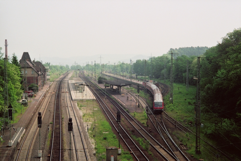 Bahnhof Eichenberg, Nordhessen - Eichenberg Railway Station, Hesse, Germany (rechts die bewaldete Kuppe "Schmiedeköpfe"]